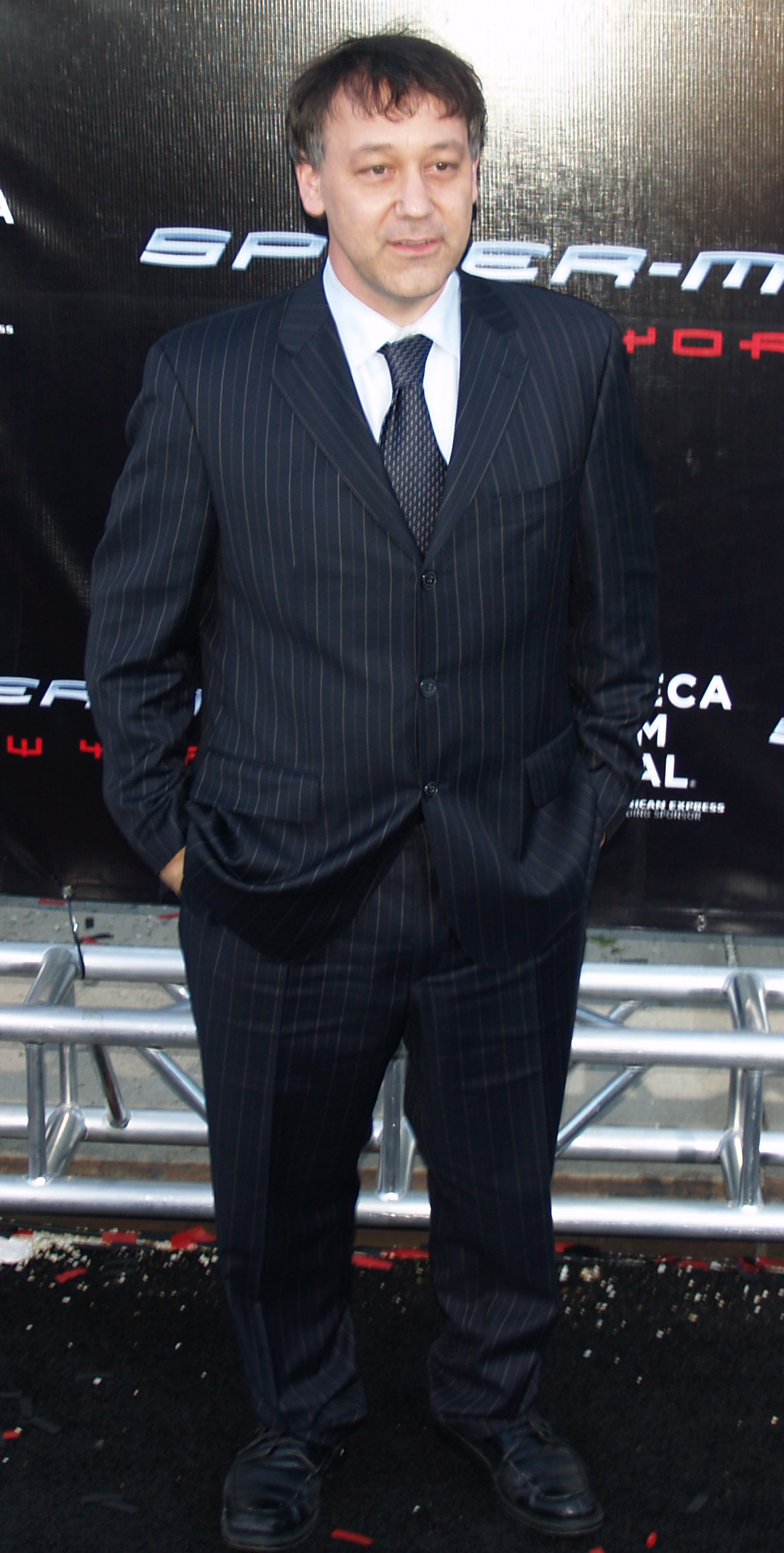 Sam Raimi